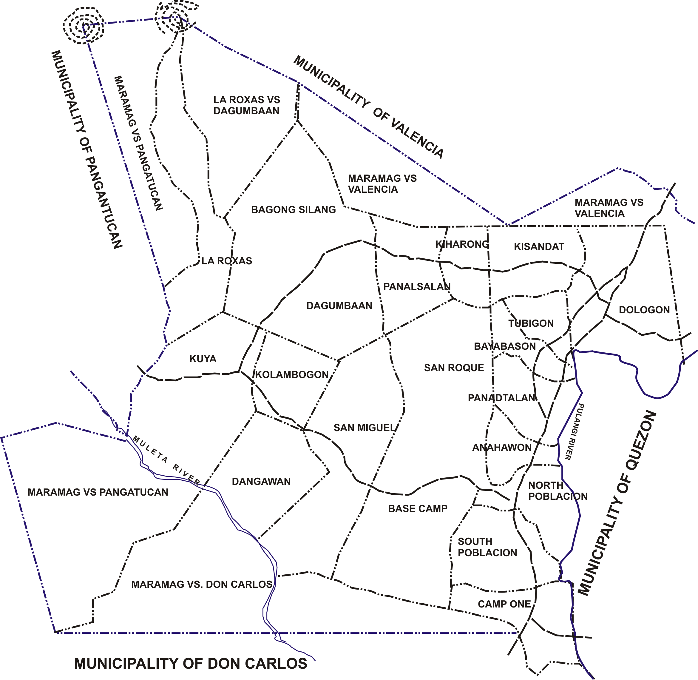 Political map of Maramag, Bukidnon